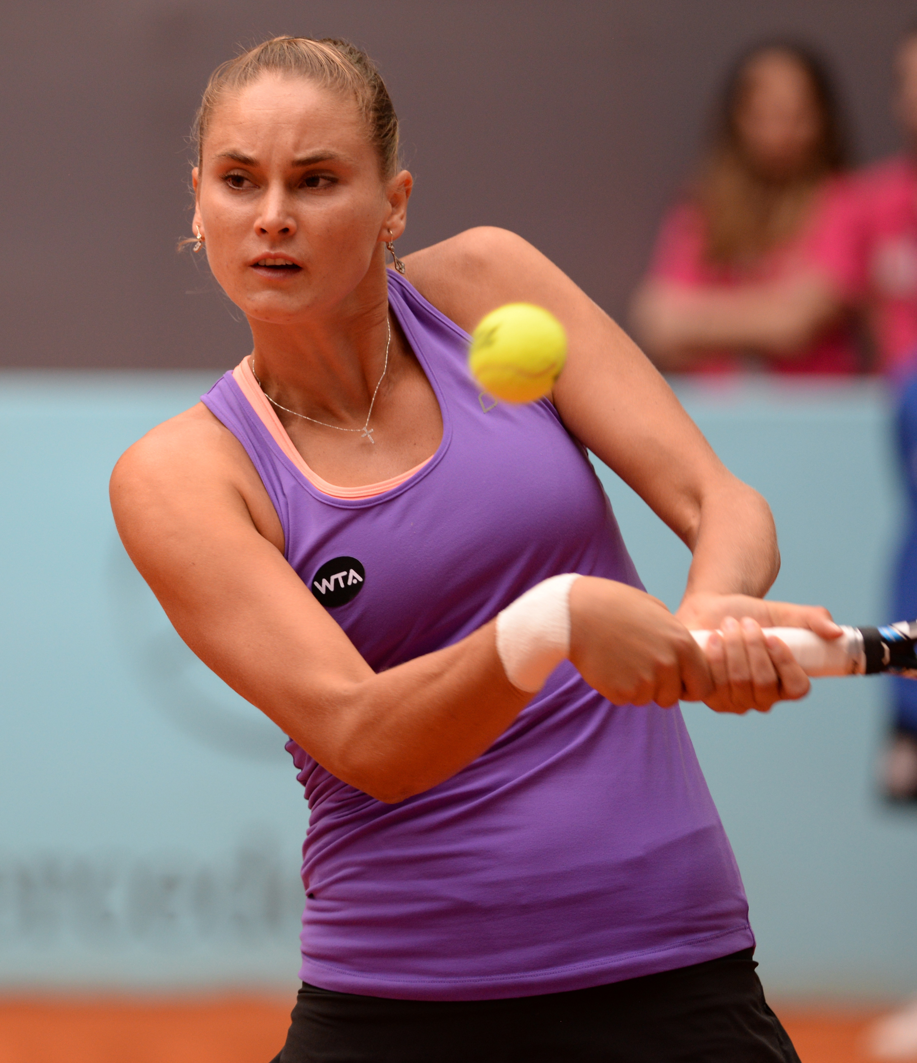 Aleksandra Panova